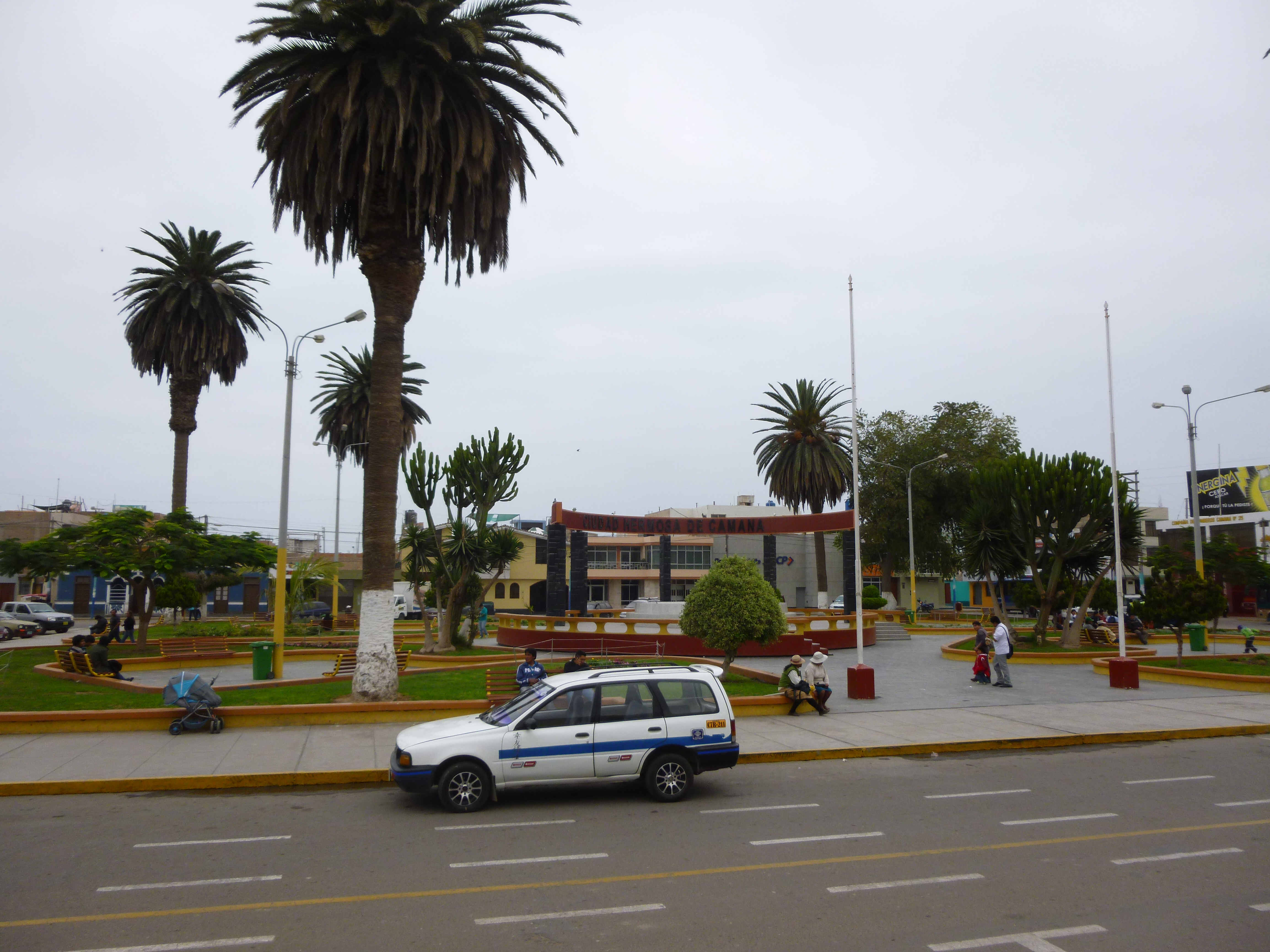 Plaza de Armas de la Villa Heroica de Camaná, Arequipa.